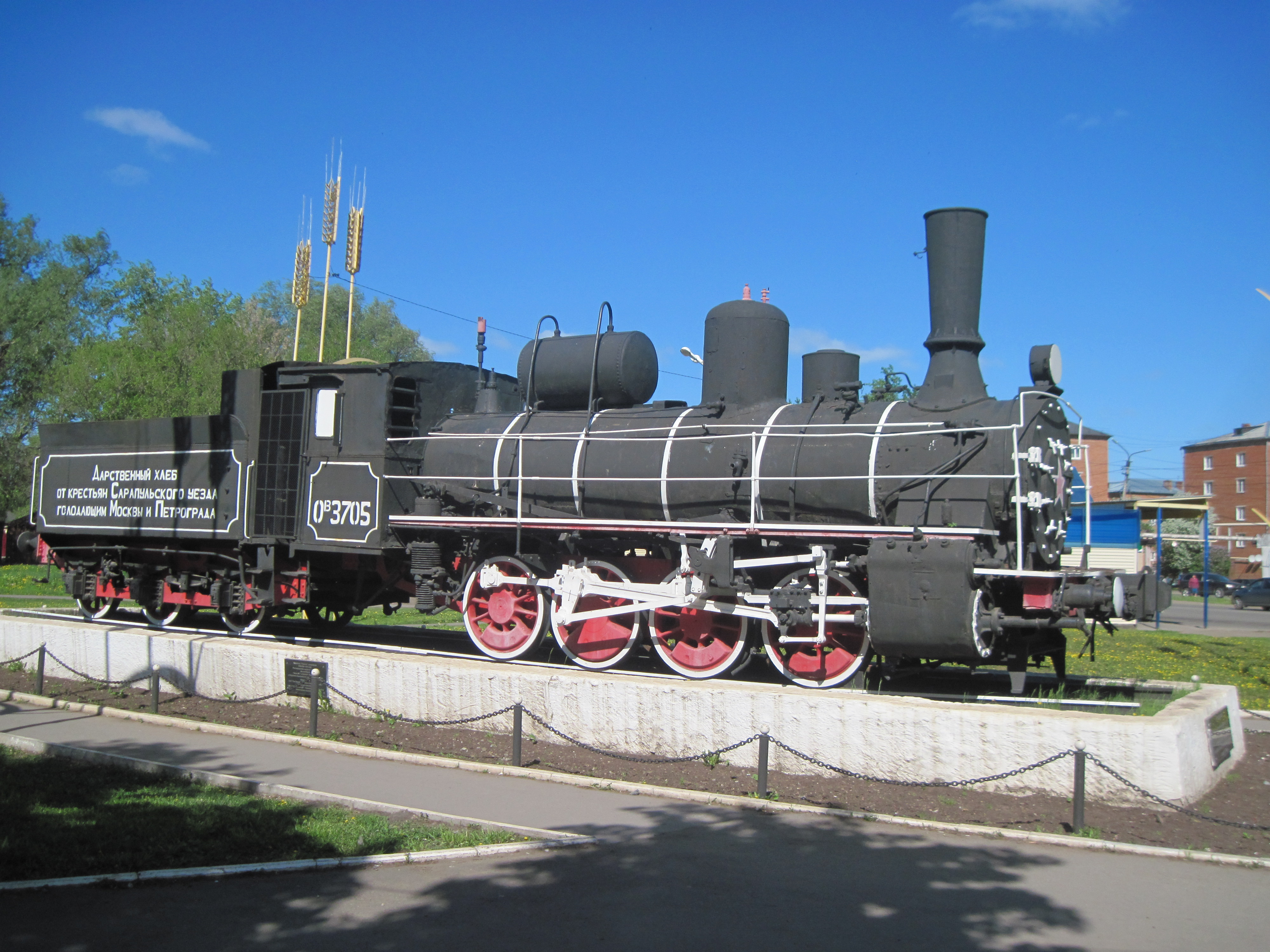 Удмуртская республика,город Сарапул,улица Путейская